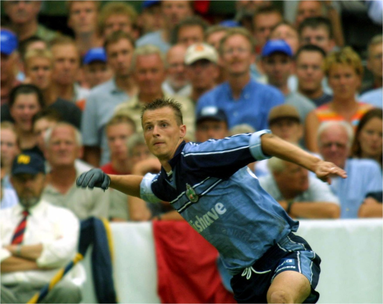 Folkert van der Wei